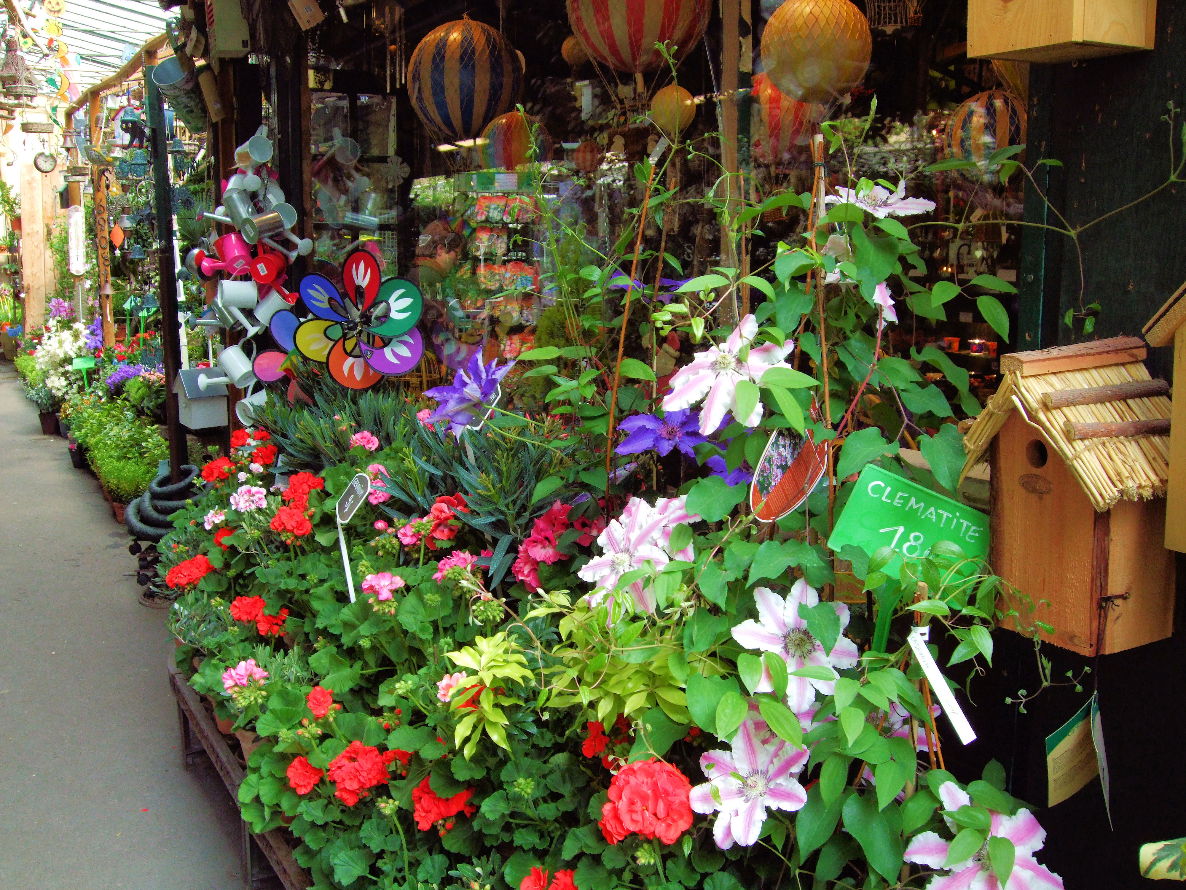 Flowers In The Marché des Fleurs - Paris.